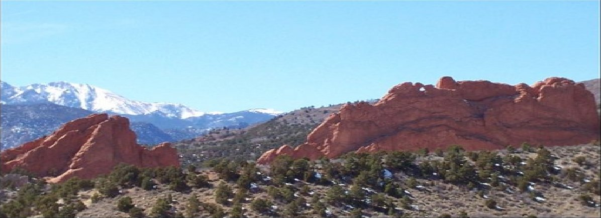 Entzerrtes Bild einer CinemaScope-Aufnahme. So sieht das obige Bildbeispiel bei der Projektion auf der Leinwand aus. Von mir modifizierte Übernahme aus der englischen Wikipedia, Photo by Wapcaplet, effects in the GIMP bei [1] Originalversion: Bild:Anamorphic lens illustration with stretching.jpg